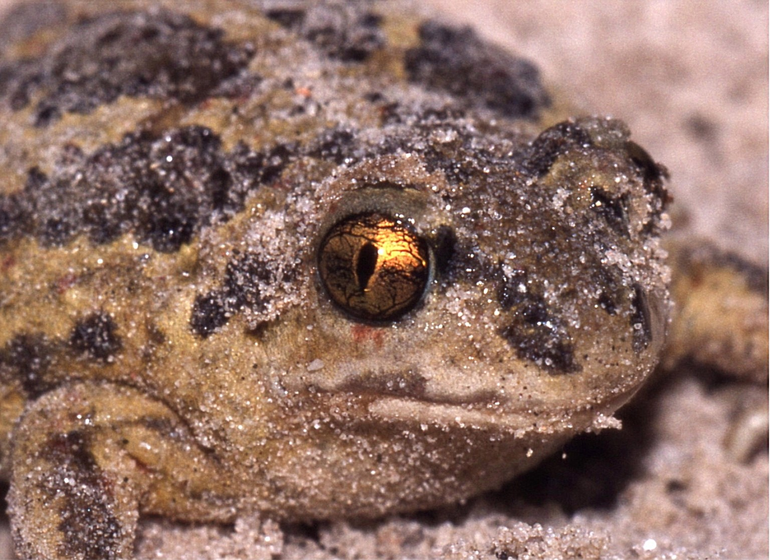 Knoblauchkröte (Pelobates fuscus) mit charakteristischem "Katzenauge".